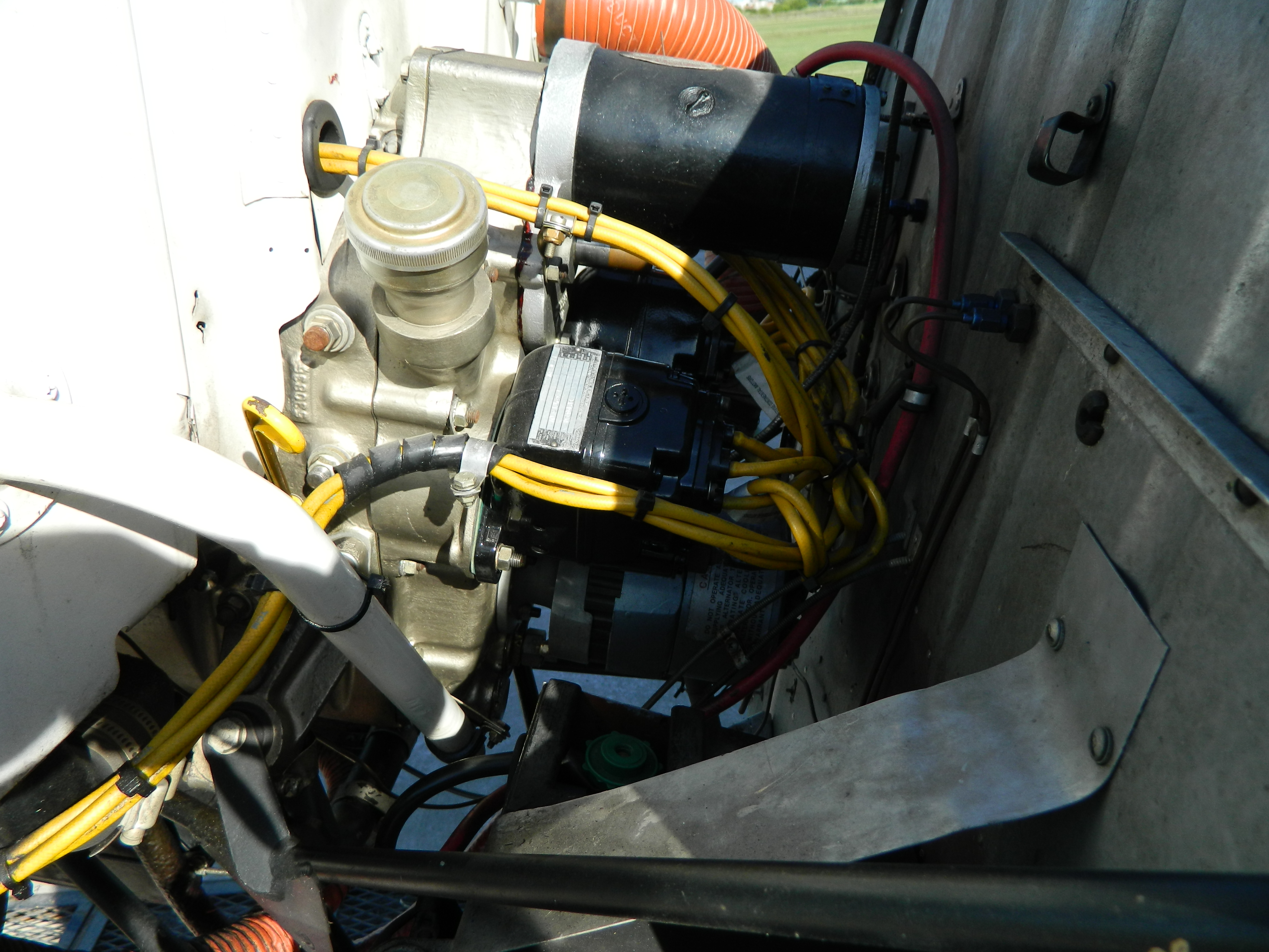 Motor Continental O-300-A, vista de su parte trasera.